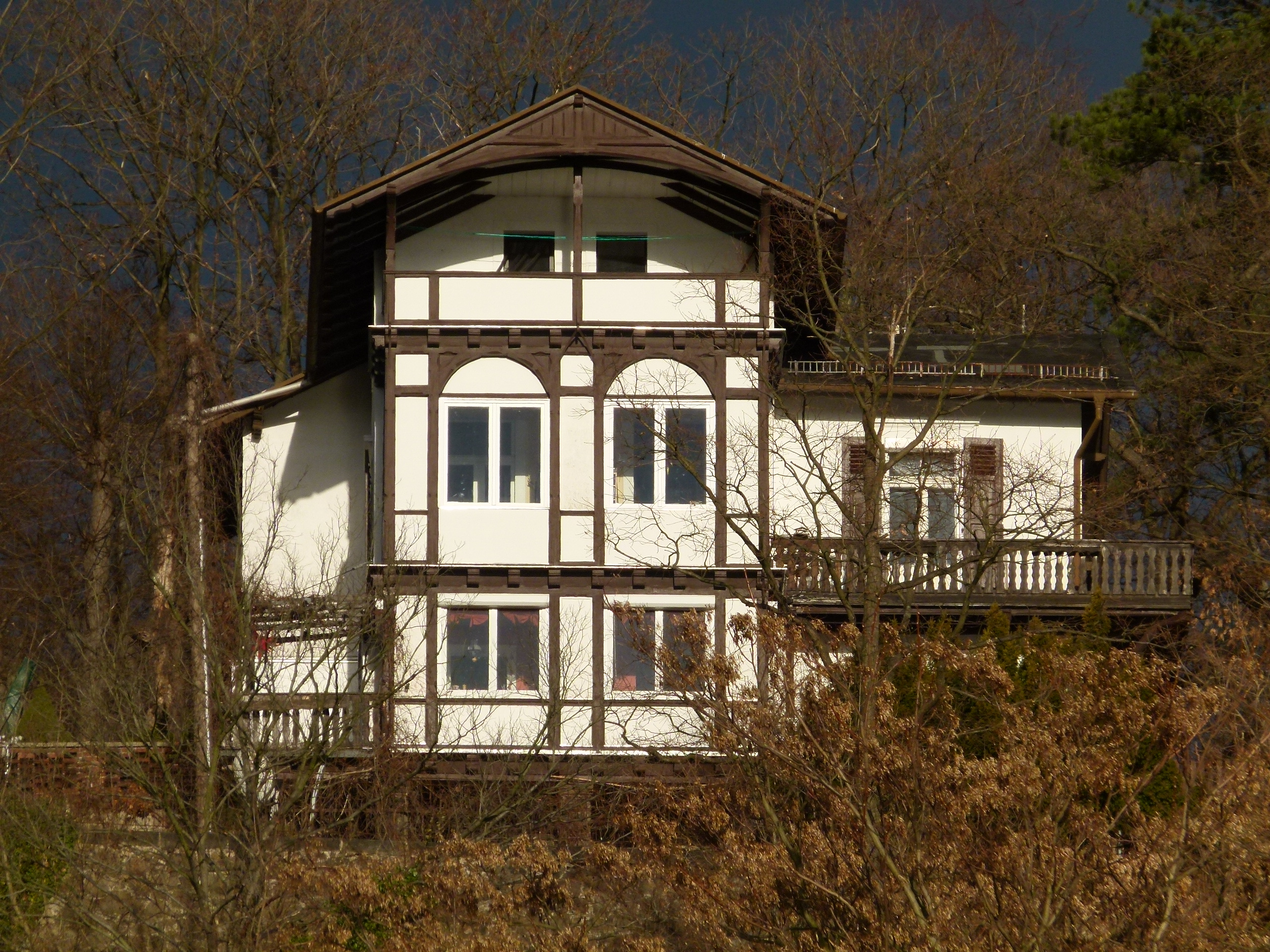 Denkmalgeschütztes Haus, Wachwitzer Bergstraße 27, Wachwitz, Dresden